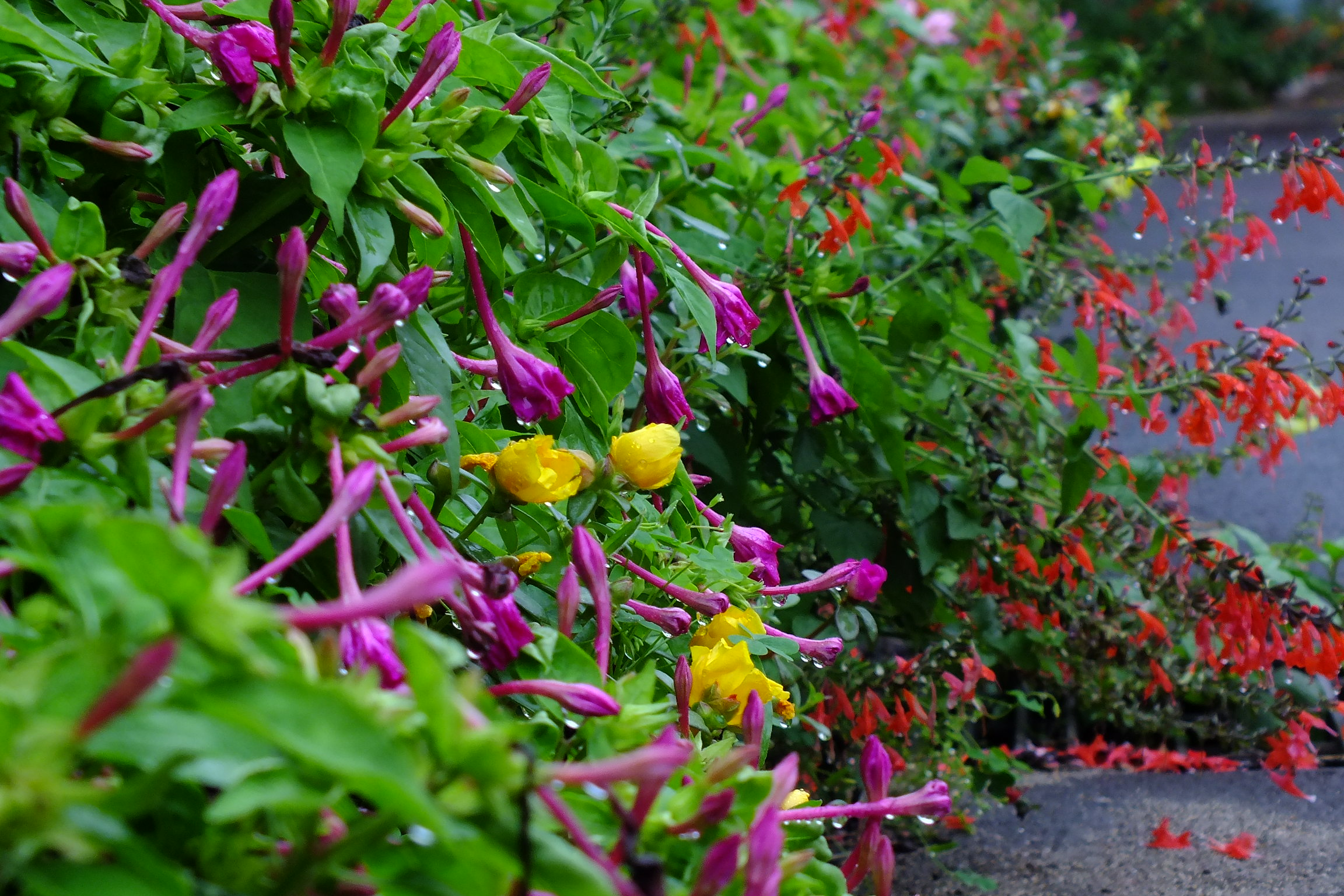 Mirabilis jalapa＆Salvia splendens